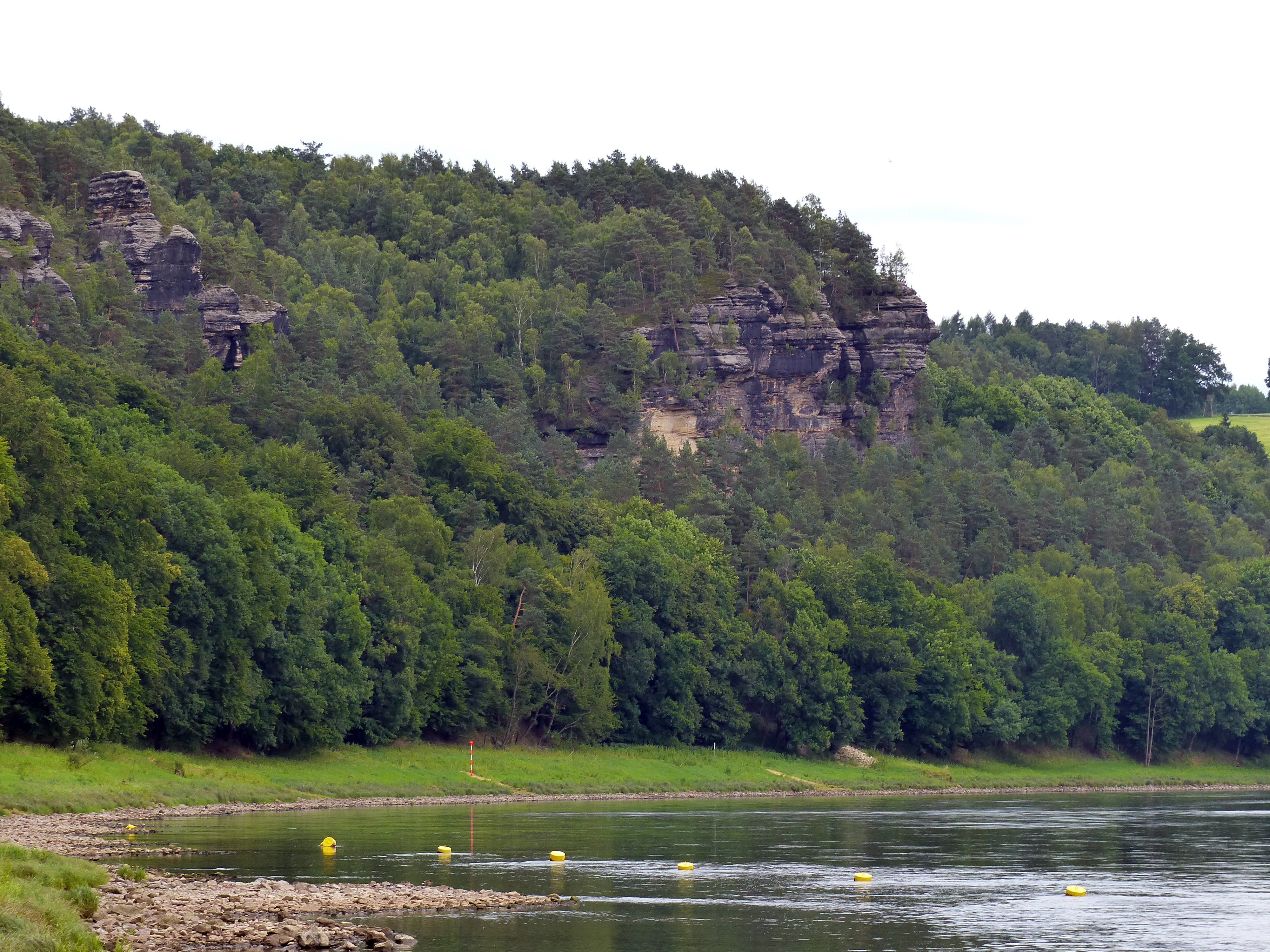 Blick auf die südlich von Rathen elbaufwärts gelegenen Teile des Landschaftsschutzgebietes sowie der rechtelbig gelegenen Teile des Nationalparks Sächsische Schweiz